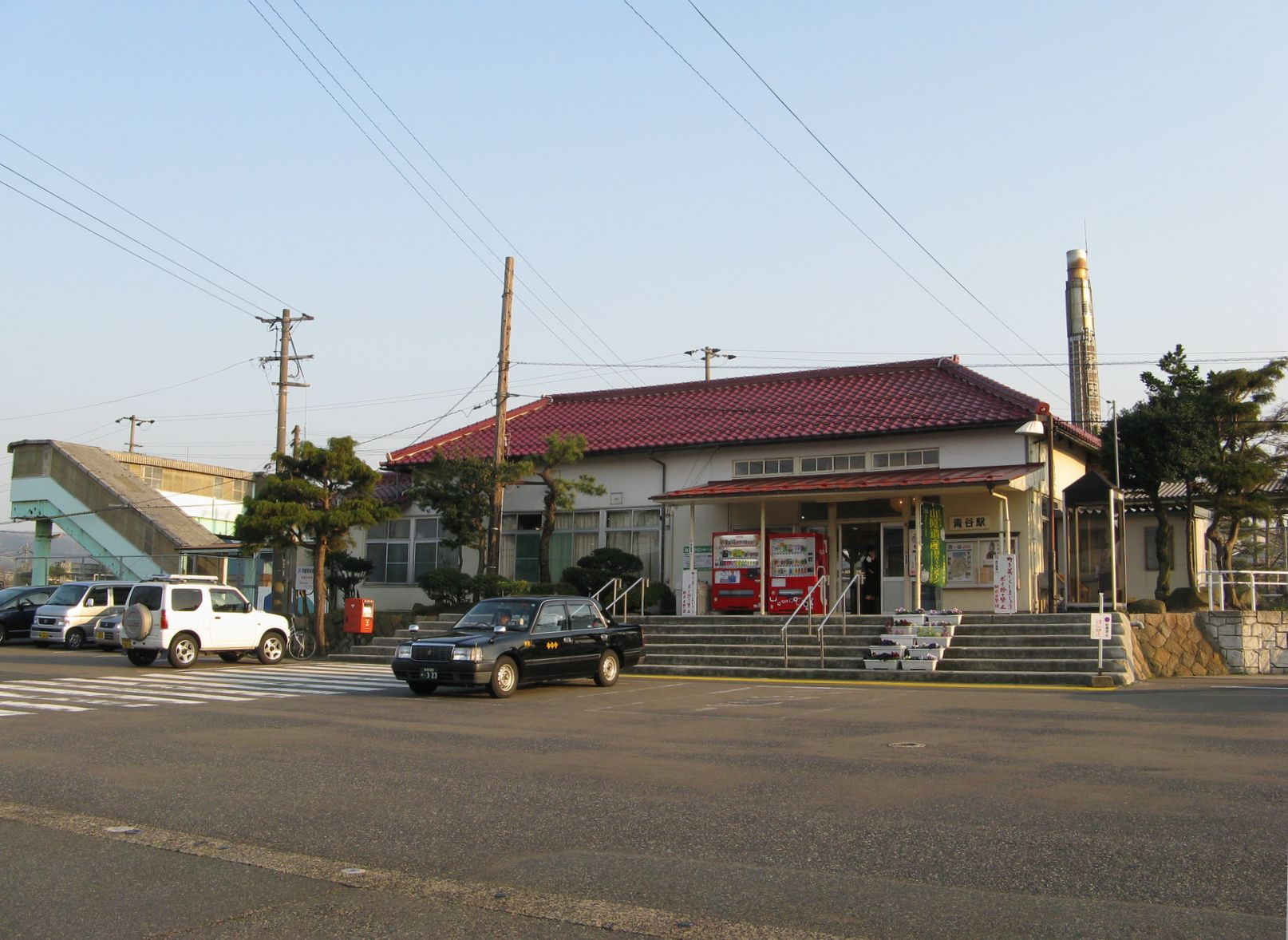 青谷駅 駅舎